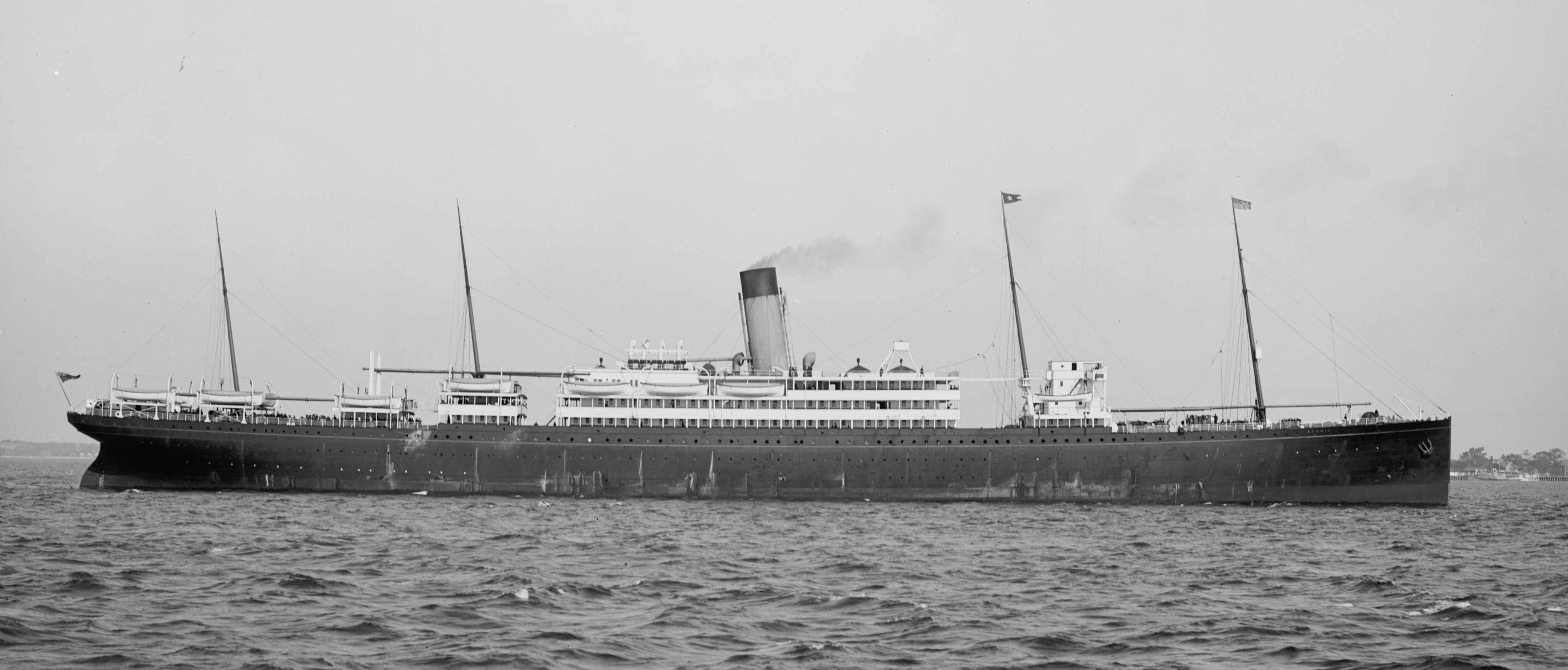 SS Arabic